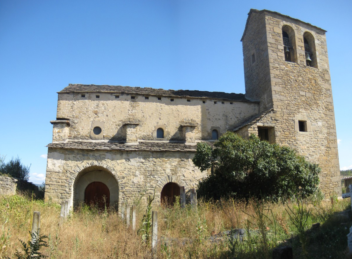 Se trata de una iglesia construida en dos fases claramente diferenciadas. La primera corresponde al ábside, de finales del s.XI y adscrita a la tipología del llamado “círculo larredense” dentro de las Iglesias del Serrablo, mientras que la segunda corresponde a la nave, del s.XII y fue construida siguiendo el estilo románico jaqués. Consta de nave única cubierta con techumbre de madera, presbiterio atrofiado y ábside semicircular peraltado, cubierto con bóveda de horno reconstruida tras perderse la original durante la Guerra Civil. Además cuenta con una torre de planta cuadrada adosada al lado meridional en el s.XV. La decoración se concentra en la parte alta del ábside y consiste en un friso de baquetones y una banda de arquillos ciegos sobre lesenas. Además existen restos de una imposta en ajedrezado jaqués, correspondiente a la segunda fase, en los muros de la nave.